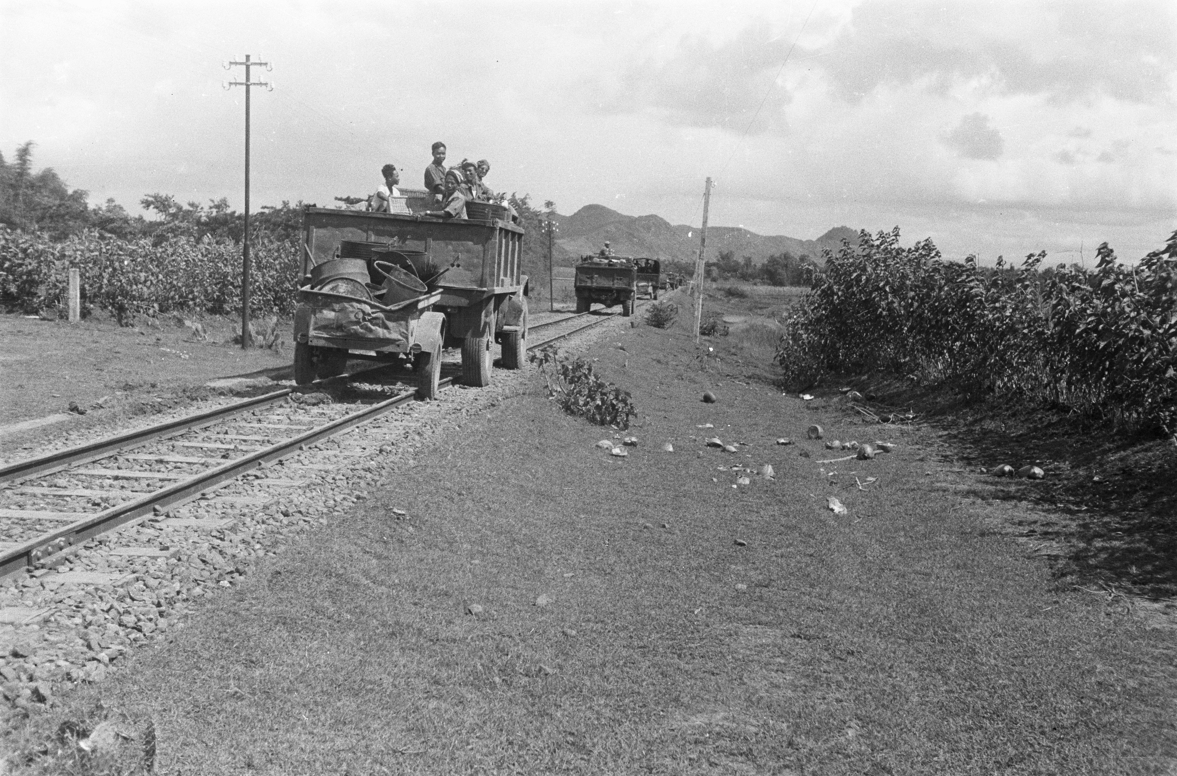 Collectie / Archief : Fotocollectie Dienst voor Legercontacten Indonesië Reportage / Serie : [DLC]Opmars naar Wonogiri en PatjitanXXX Beschrijving : [een militaire colonne gebruikt de spoorlijn als opmarsroute] Datum : januari 1949 Locatie : Indonesië, Java, Nederlands-Indië Fotograaf : Burgt, Th. van de / DLC Auteursrechthebbende : Nationaal Archief Materiaalsoort : Negatief (zwart/wit) Nummer archiefinventaris : bekijk toegang 2.24.04.02 Bestanddeelnummer : 3118